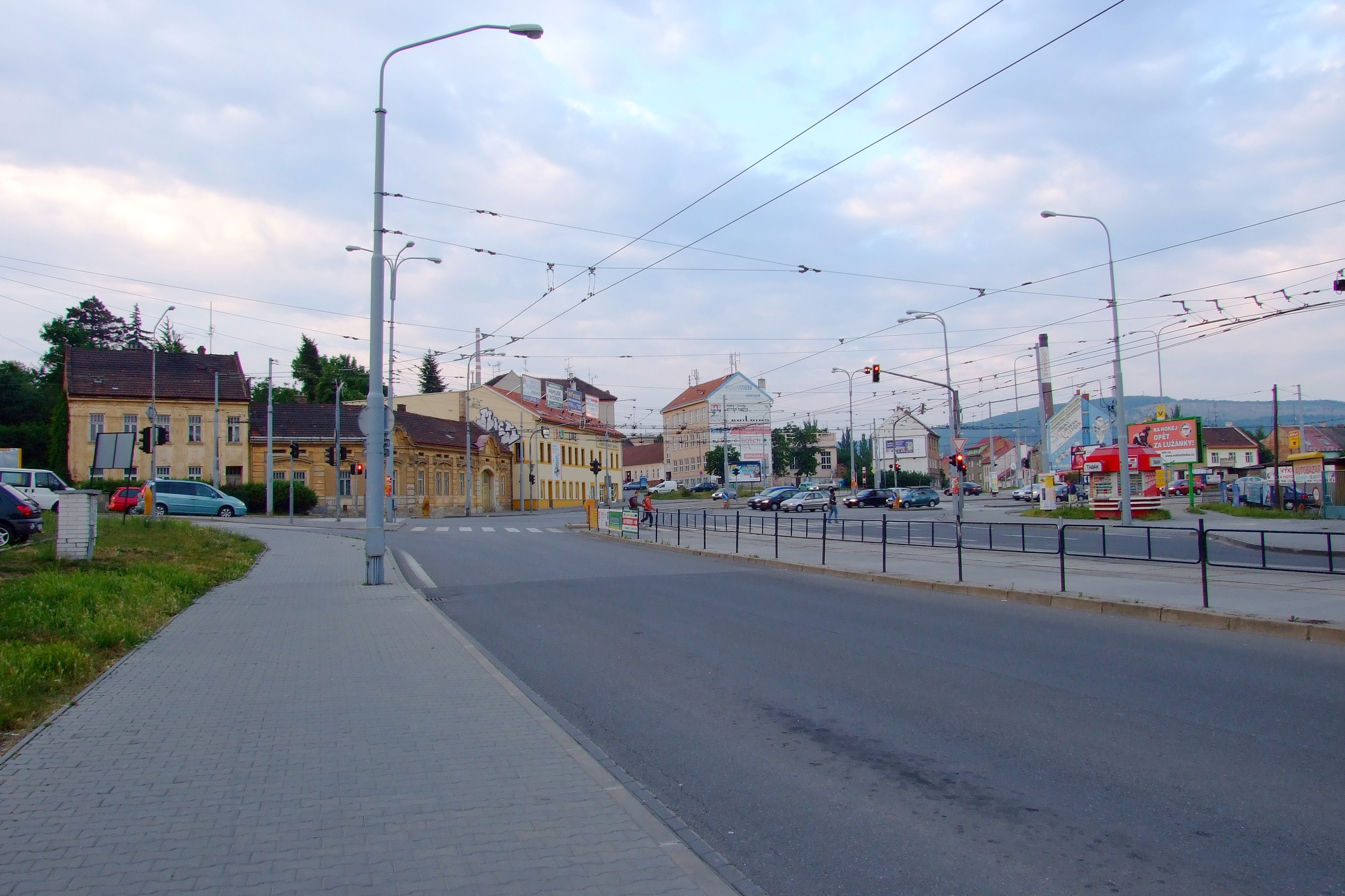 Tomkovo náměstí v Brně-Husovicích